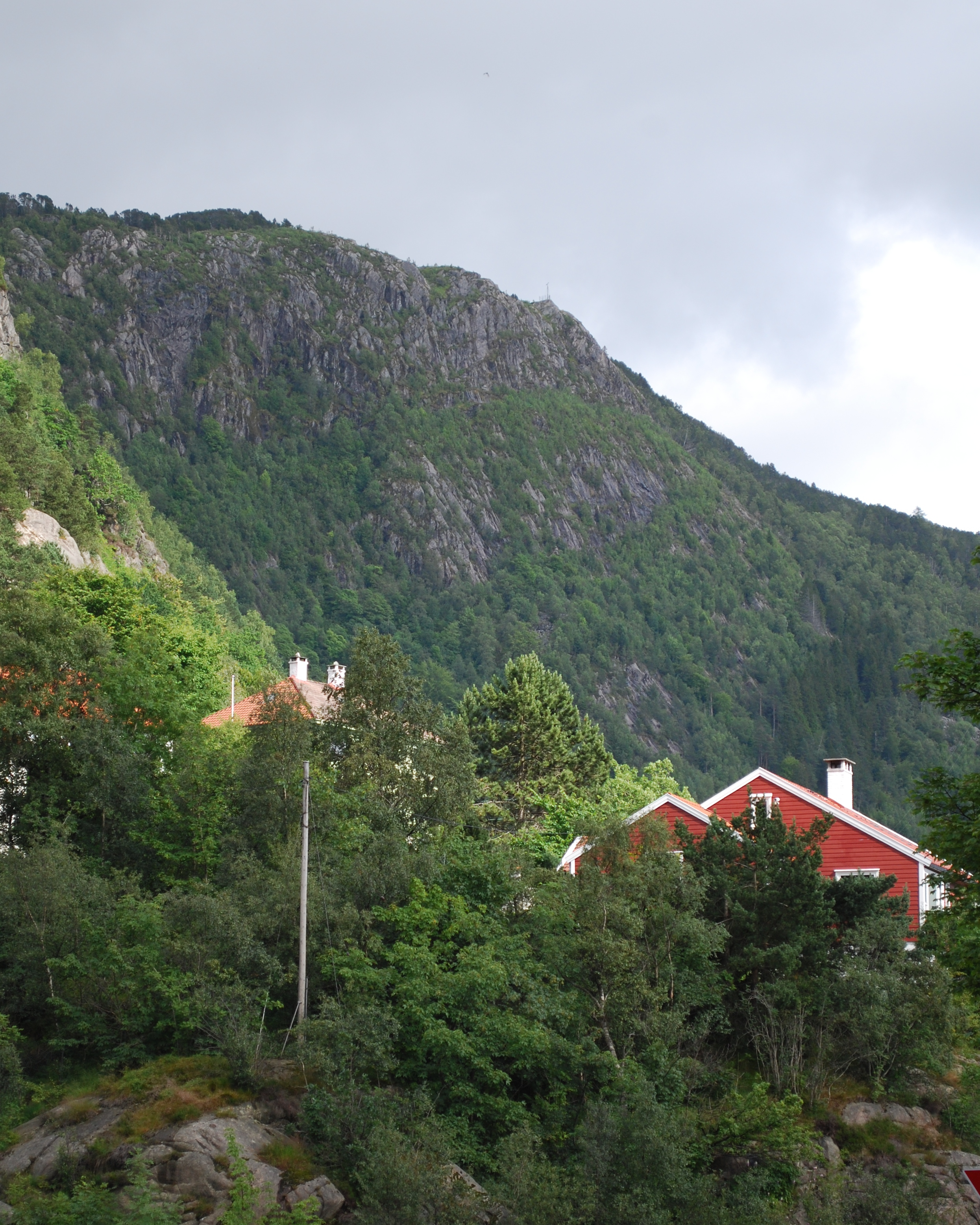 Sandviksfjellet i Bergen, Sandviksfjellet / Stoltzekleiven